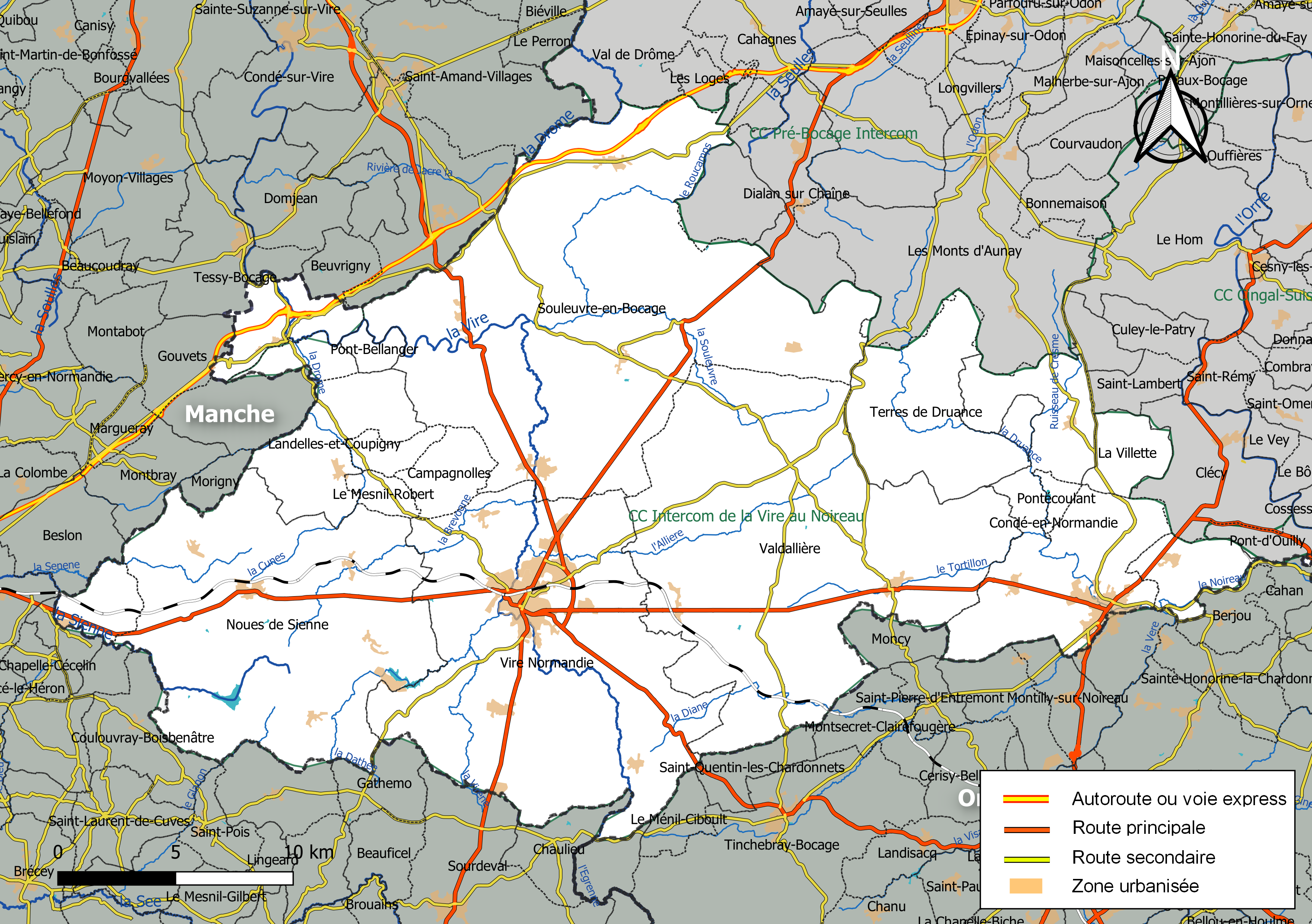 Carte géographique de la Communauté de communes Intercom de la Vire au Noireau, département du Calvados, France. Composition au 1er janvier 2019.